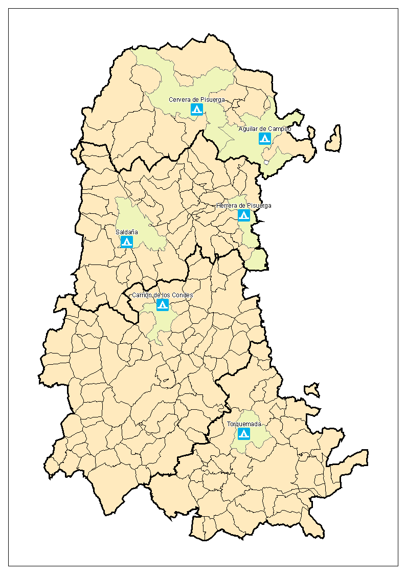 campings en la provincia de palencia